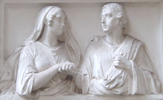 Relief des Grabdenkmals für das Ehepaar Niebuhr auf dem Alten Friedhof in Bonn